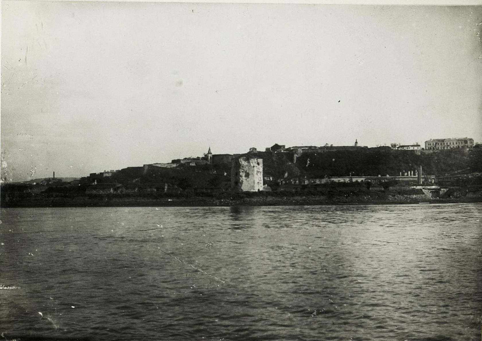 Festung Belgrad mit "Nebojse" Turm.